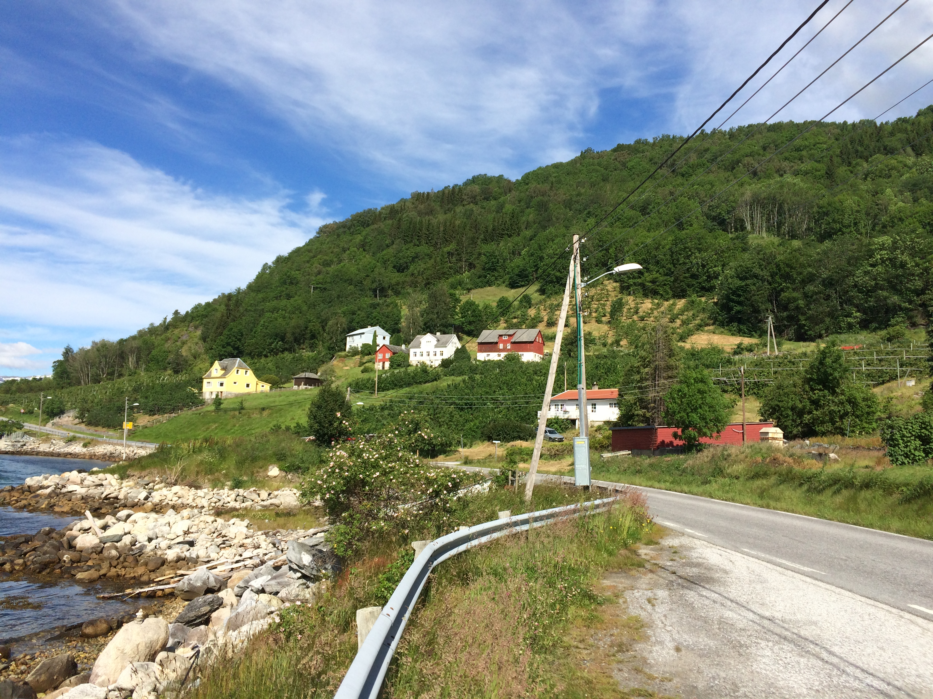 Riksvei 55 vestover i Leikanger